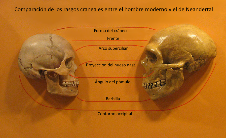 Comparación de cráneos de humano moderno y neandertal del Museo de Historia Natural de Cleveland con texto en español